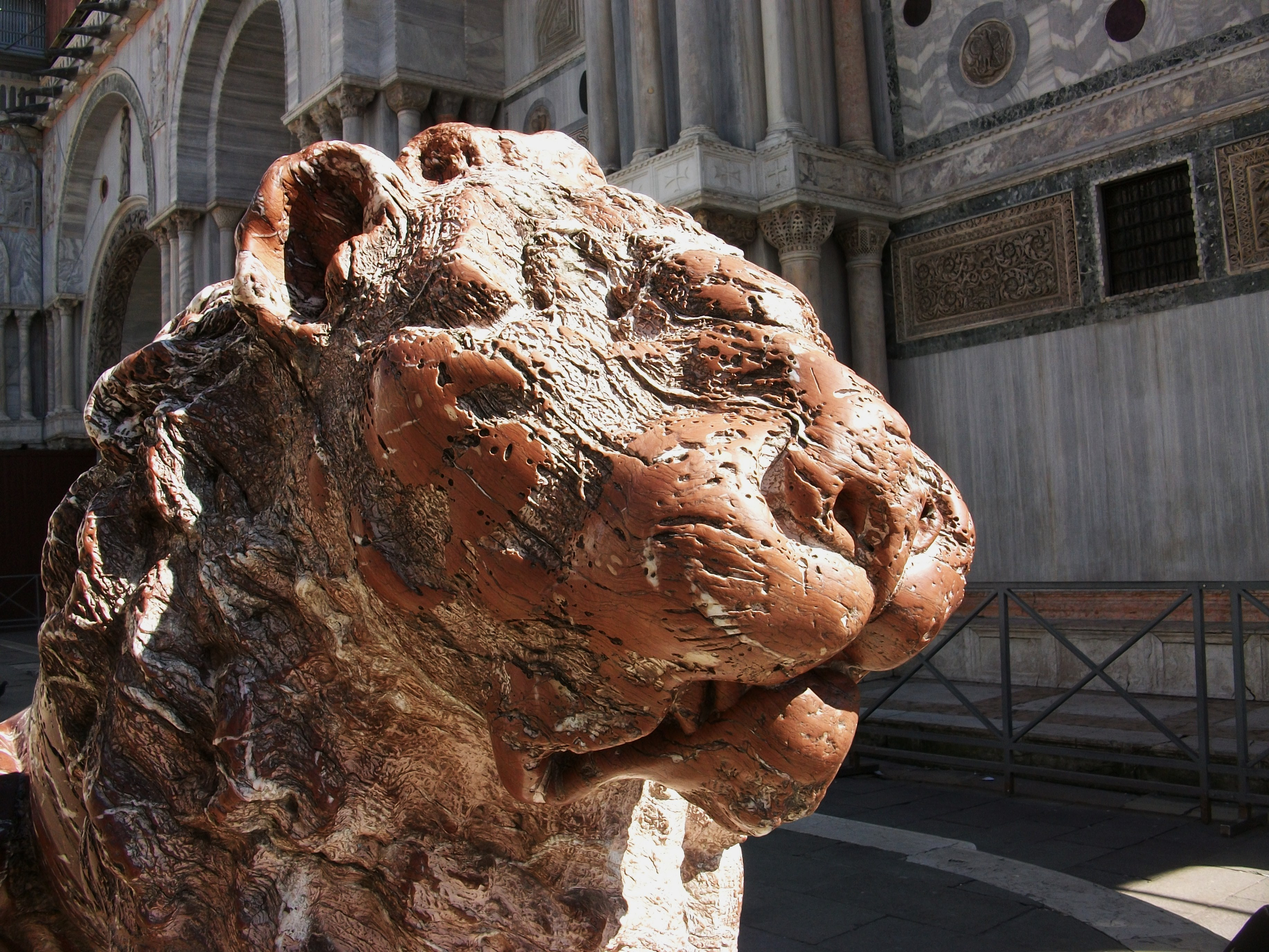 Lleó de la piazzetta dei leoncini, Venècia.